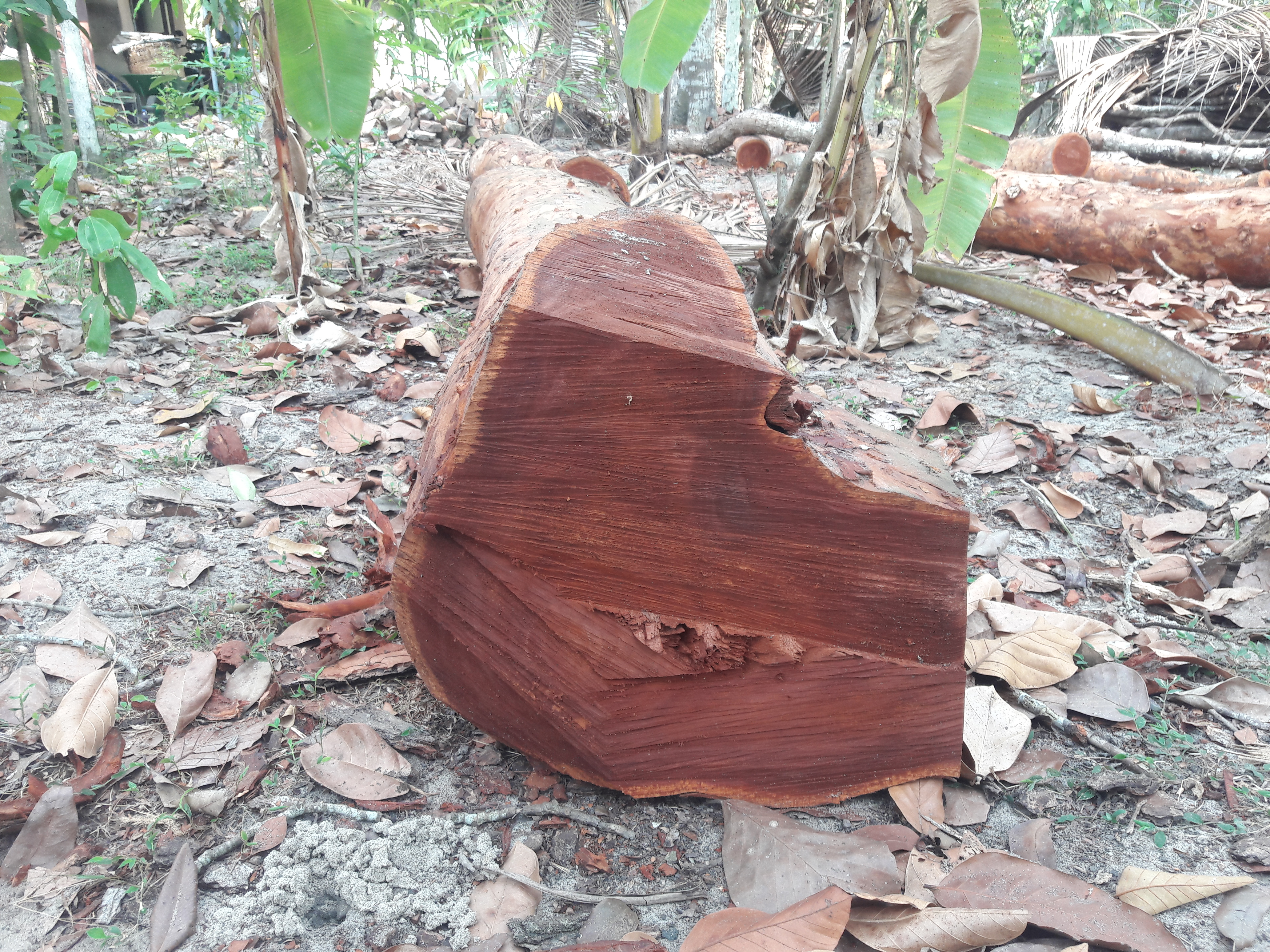 വിളവെടുപ്പ് കഴിഞ്ഞ ഒരു മഹാഗണി. Mahogany tree ശാസ്ത്രീയ നാമം Swietenia macrophylla കുടുംബം Meliaceae.